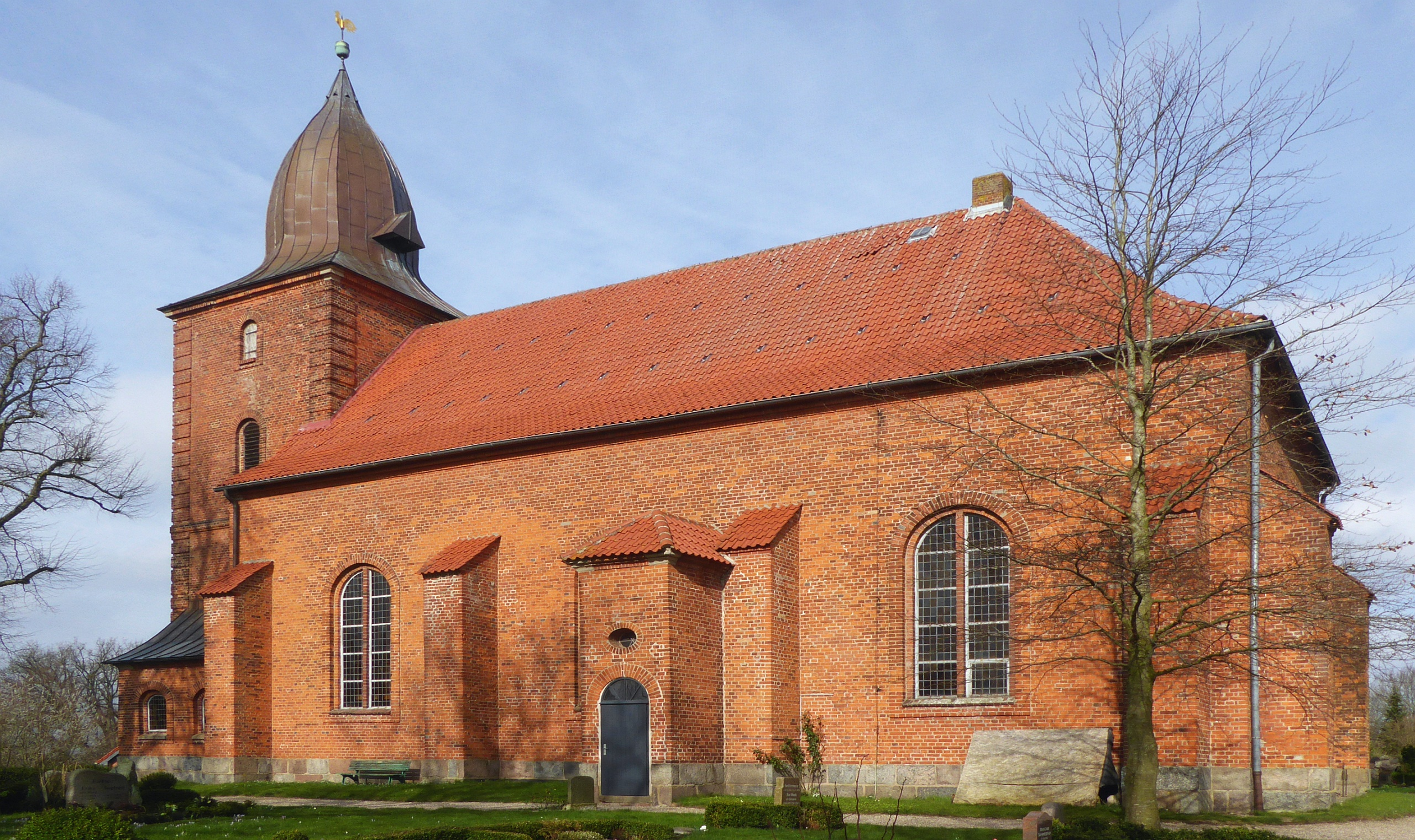 Dreifaltigkeitskirche Krusendorf, erbaut 1733 bis 1735, eingeweiht 1737 - Schwedeneck Dänischer Wohld Schleswig-Holstein - Errichtung unter Patronat Graf Joachim von Brockdorff zu Gut Noer - Foto Wolfgang Pehlemann P1350937